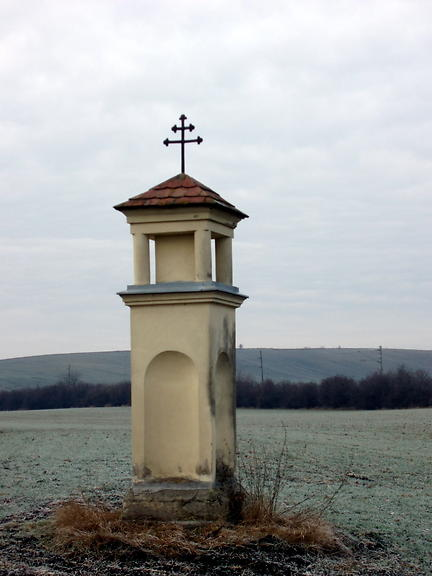 Boží muka (Dřevnovice), S okraj obce, Dřevnovice